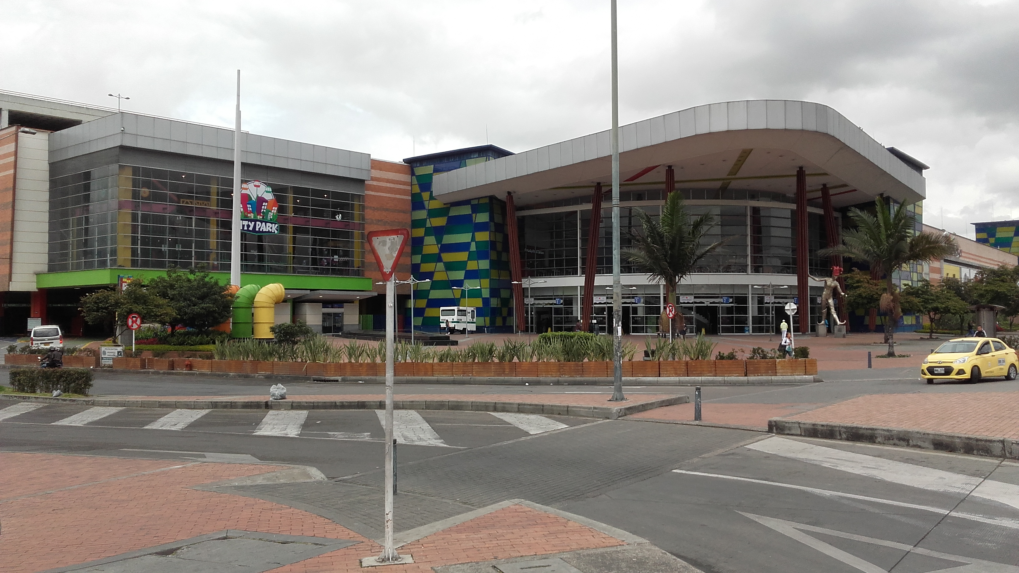 fnfkkdkdkekkekkekndnkdndn